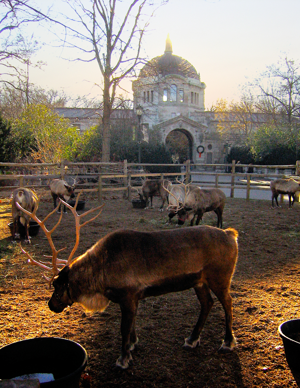 Bronx Zoo